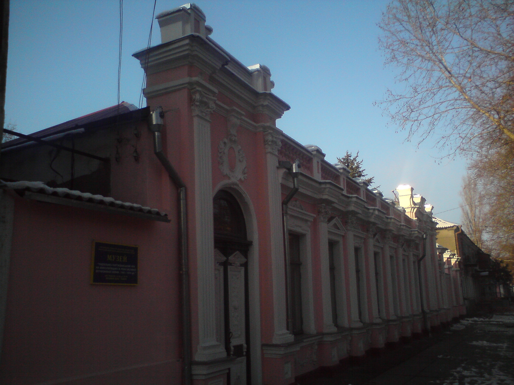 Музей «Підпільно-партизанський рух на Миколаївщині в роки Великої Вітчизняної війни. 1941–1944 рр.»